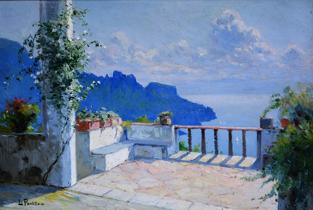 Villa Rufolo a Ravello, olio su tavola, cm 31 x 47, firmato, Musei Aiello, Moliterno.